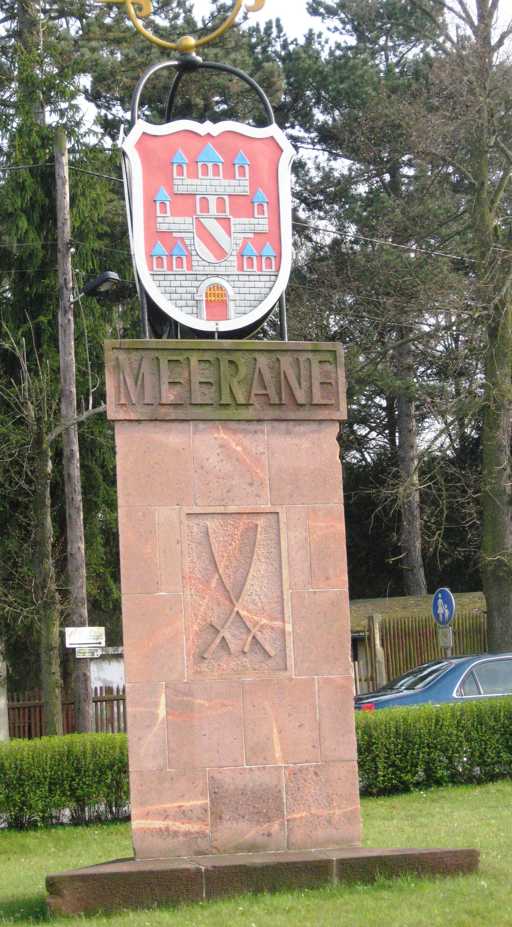 Ortsschild von Meerane